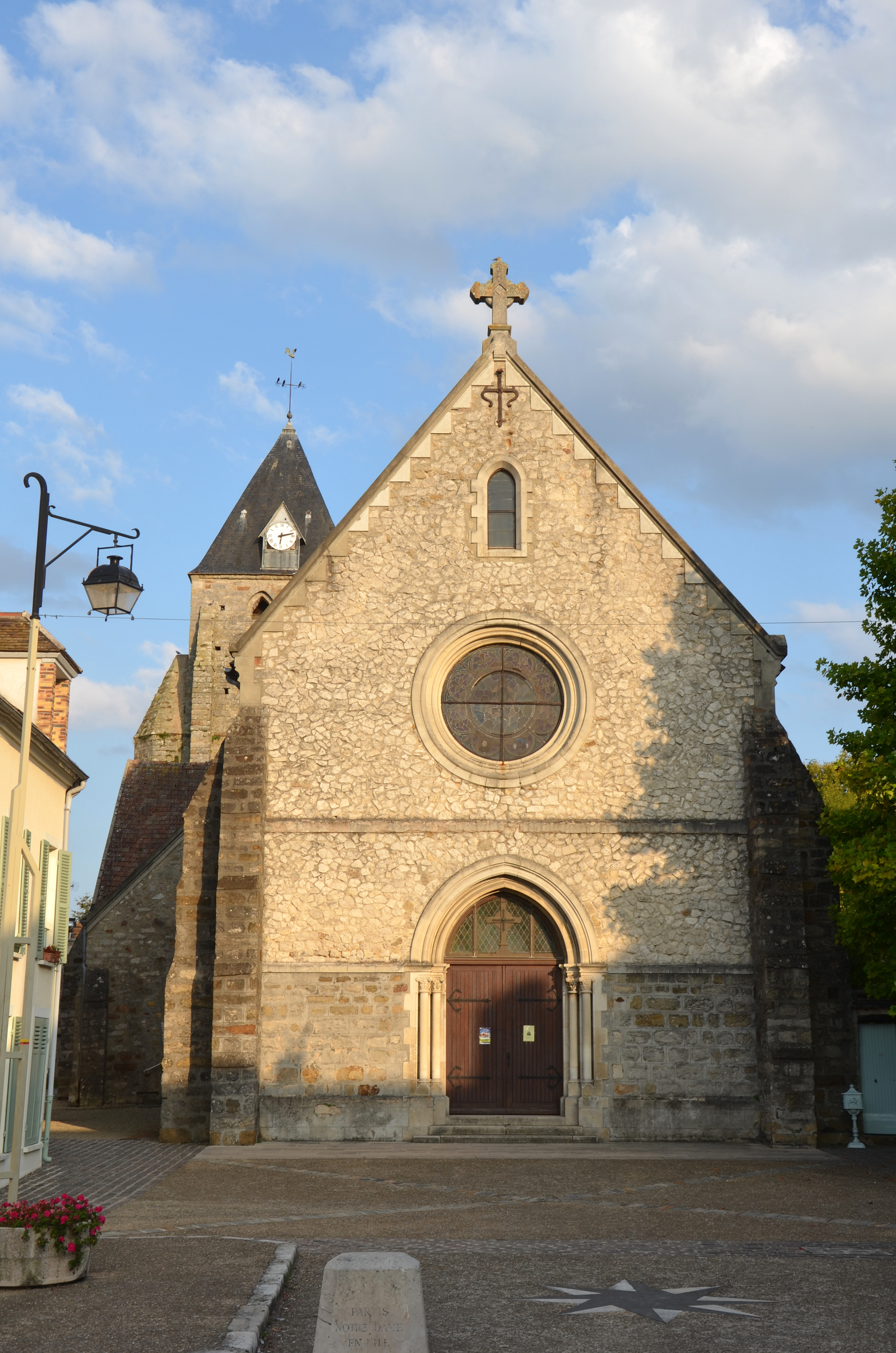 Eglise de Voulx (Seine-et-Marne), France. .